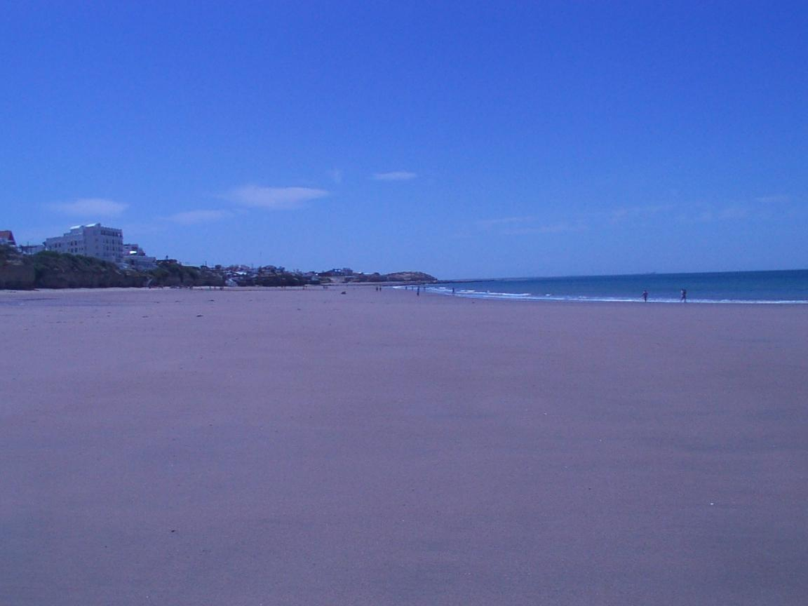 Segunda y tercera bajada.